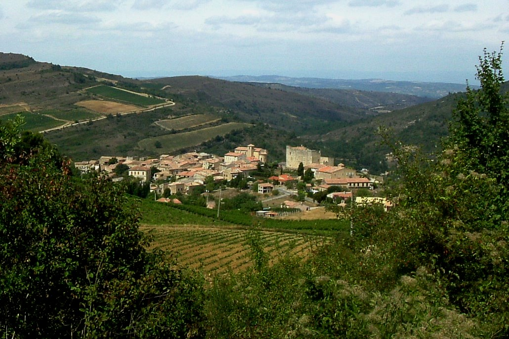 Vue du village de Roquetaillade (Aude, France).